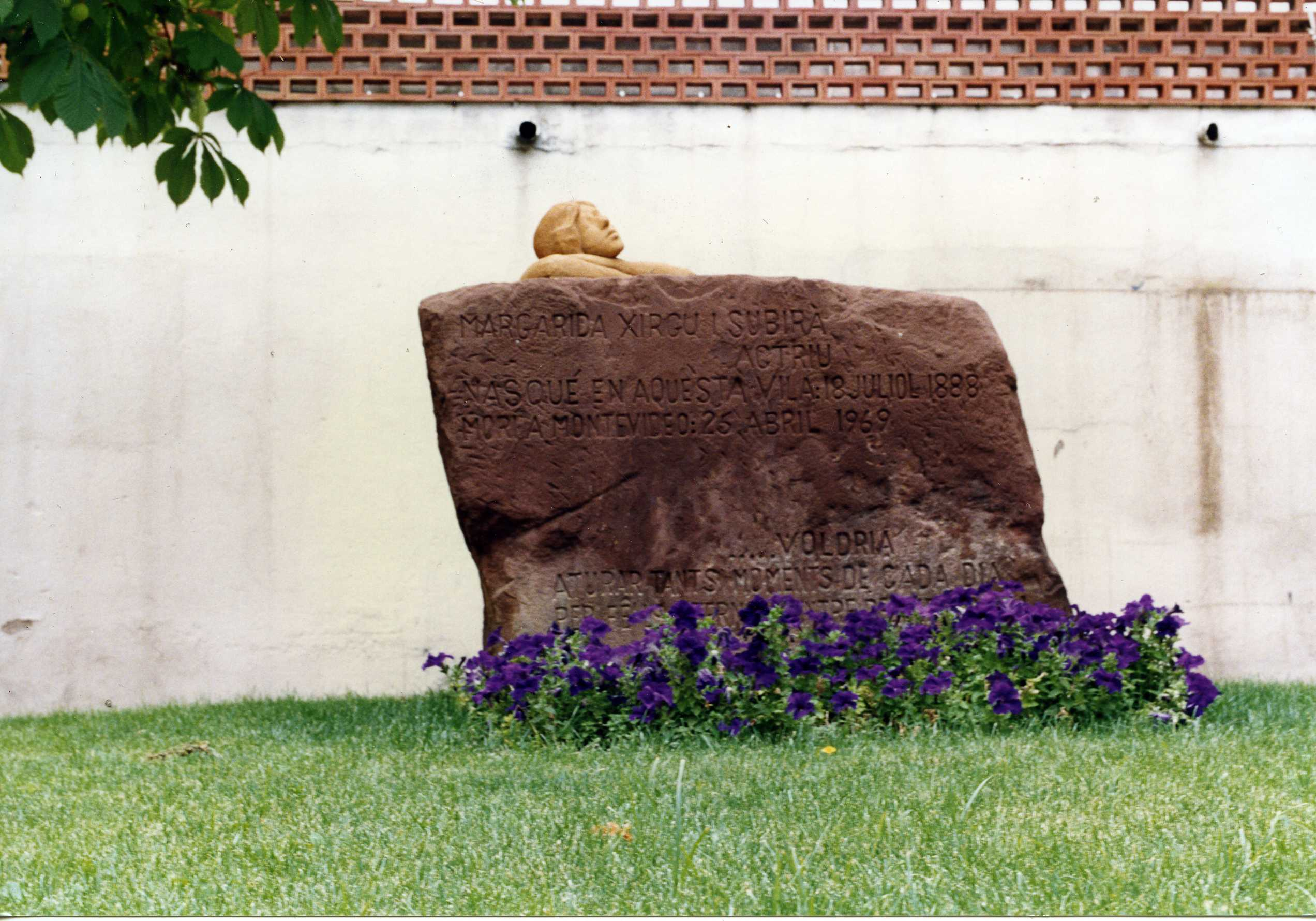 Monument a Margarida Xirgu i Subirà - 1980